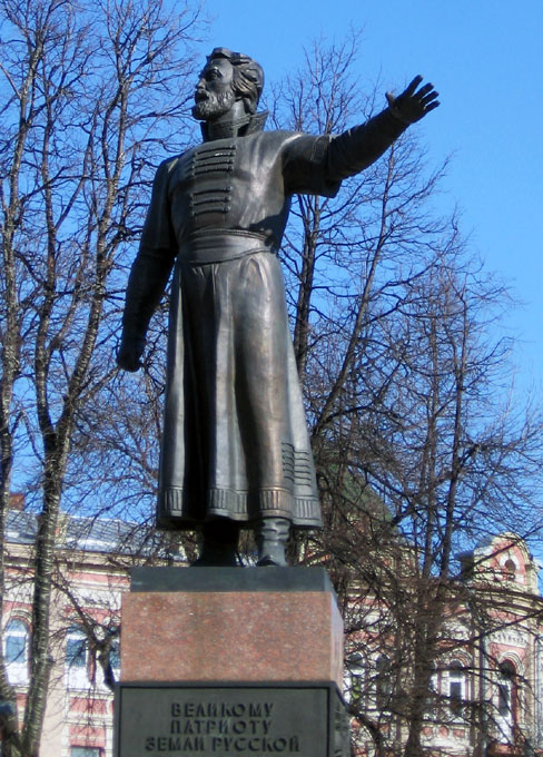 Памятник Кузьме Минину: площадь Минина и Пожарского, Нижний Новгород, Нижегородская область